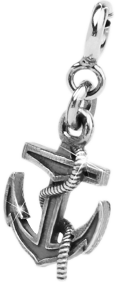 Маленький чарм-подвеска. Серебро 925.